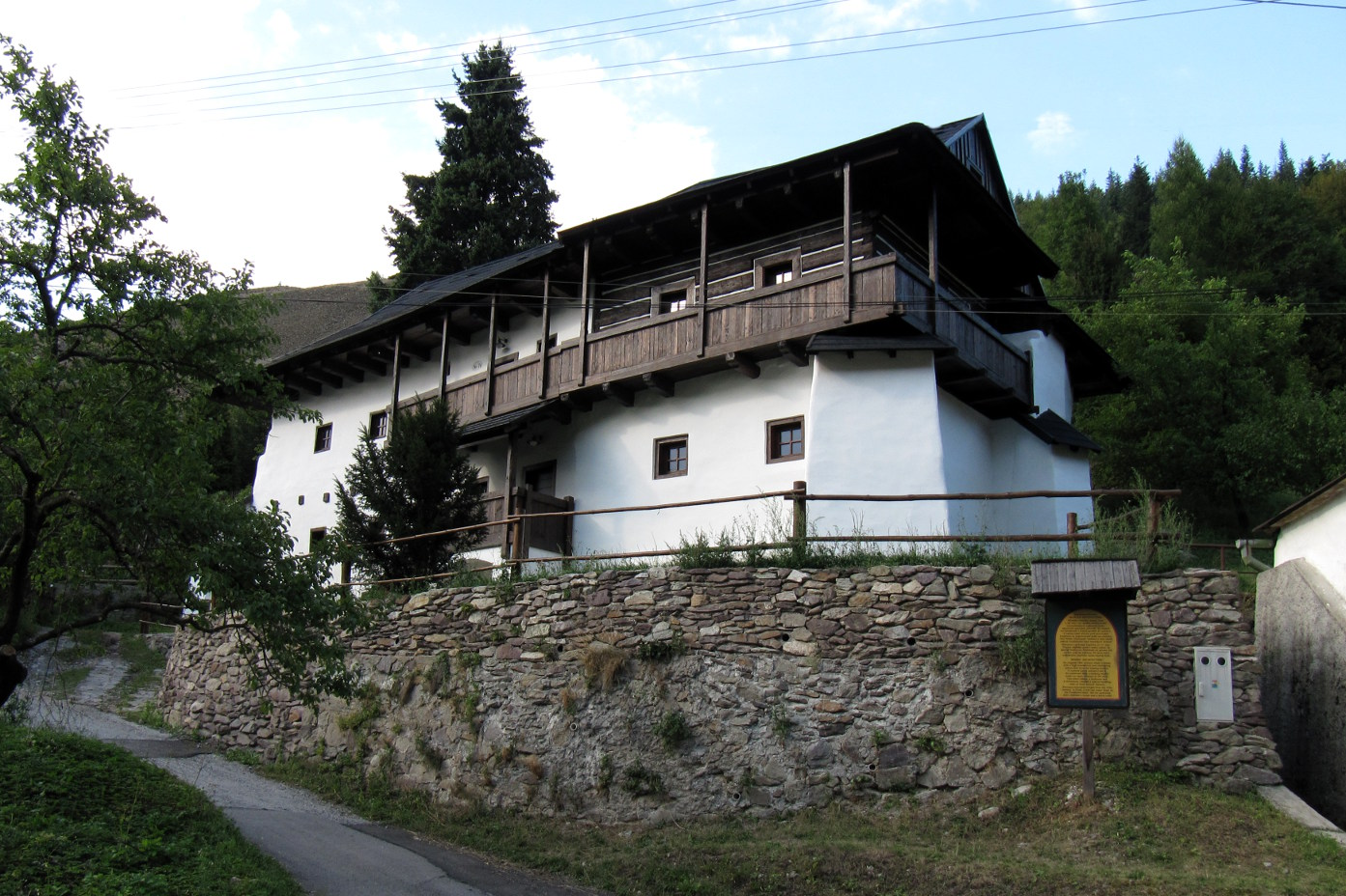 Dom banícky